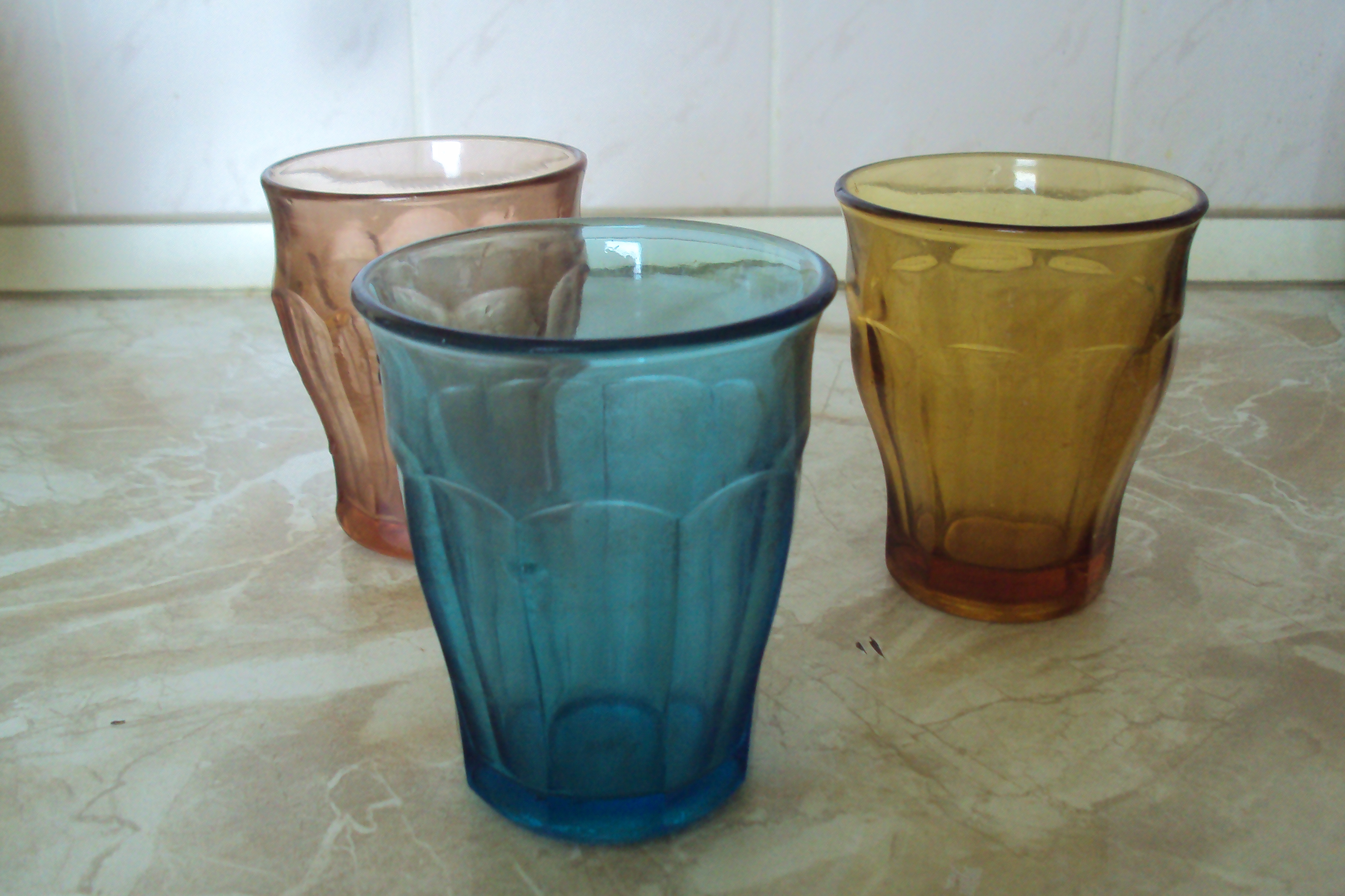 Česky: České sklenice typu Duritky